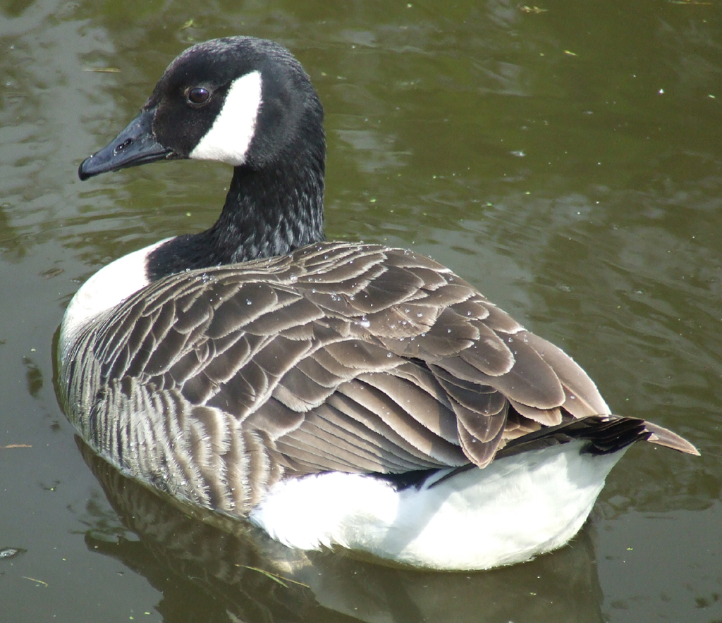 Canada goose at Sankey Valley Park